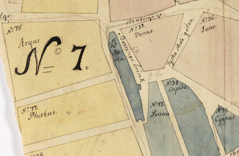 Del av plan av Stockholms stad mellan Norr- och Söderström 1733 (kvarteret Medea). Norr är nedåt.